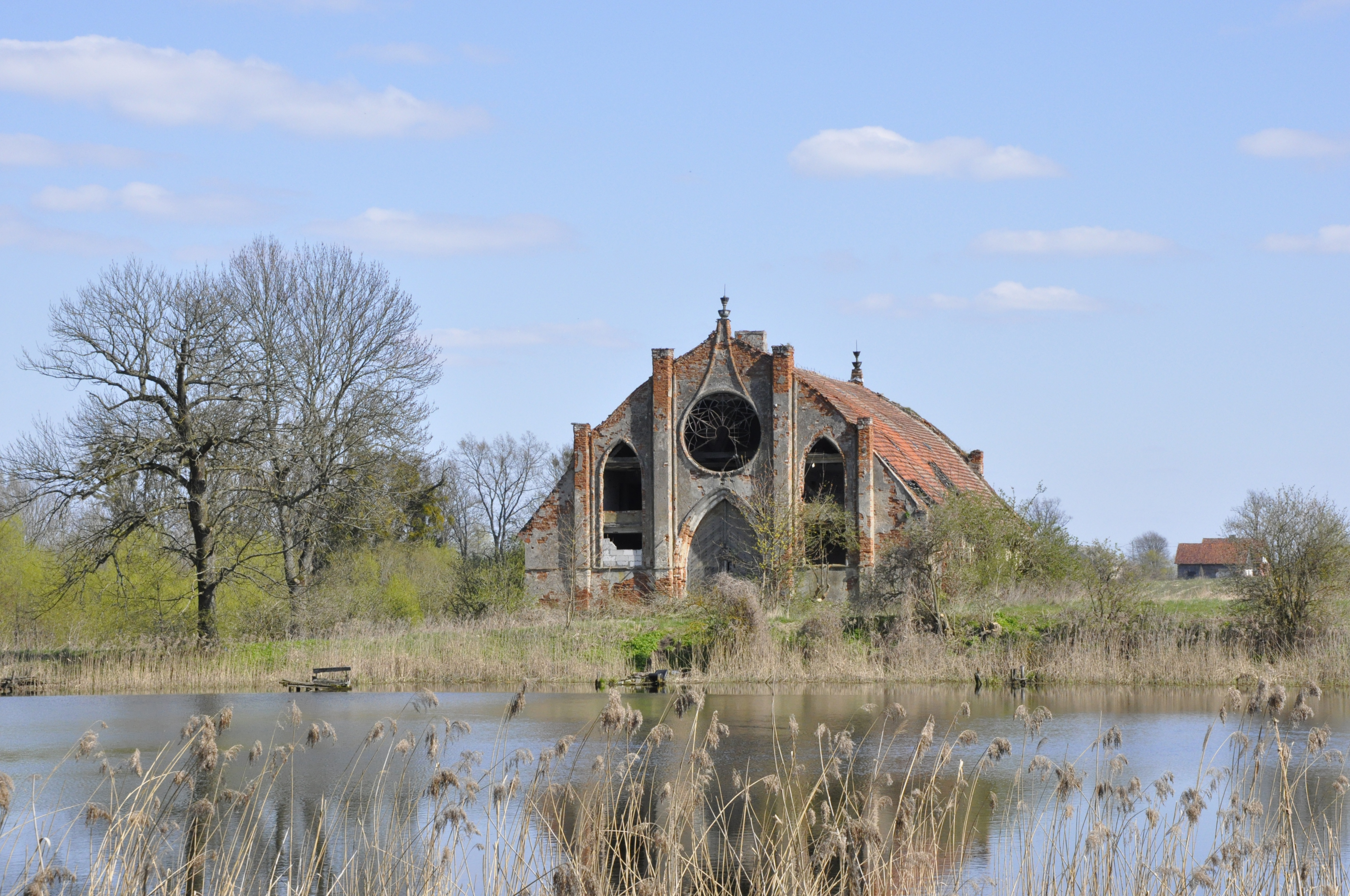 Der sich in Drogosze befindliche und zum Schloss Dönhoffstädt gehörende Marstall im Jahr 2017